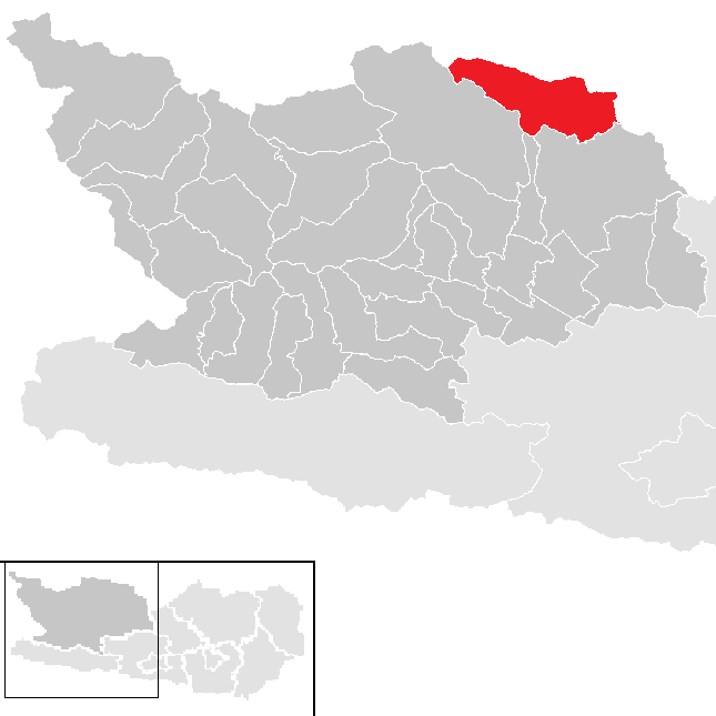 Bezirk Spittal an der Drau